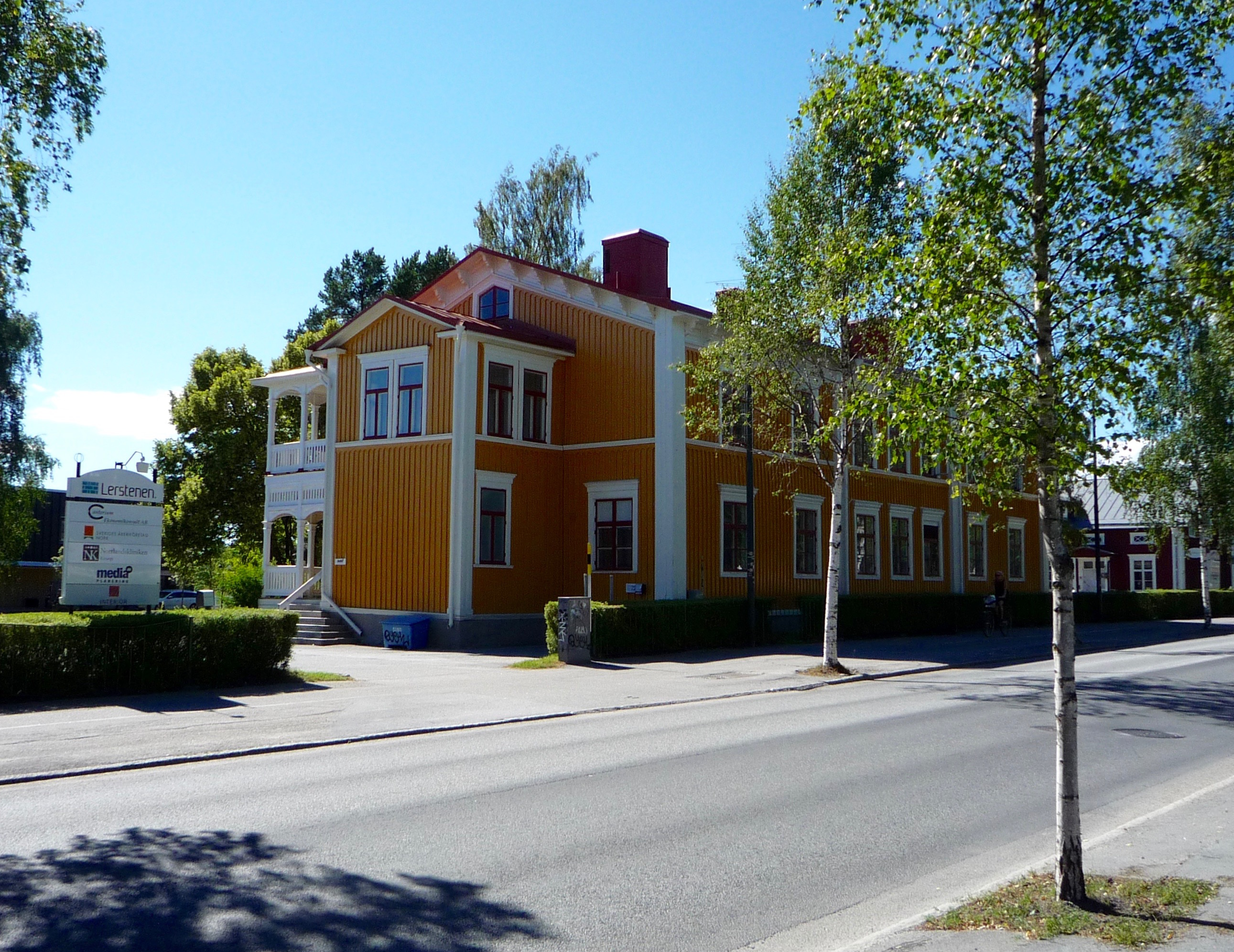 Umeå första lasarett, vid Storgatan